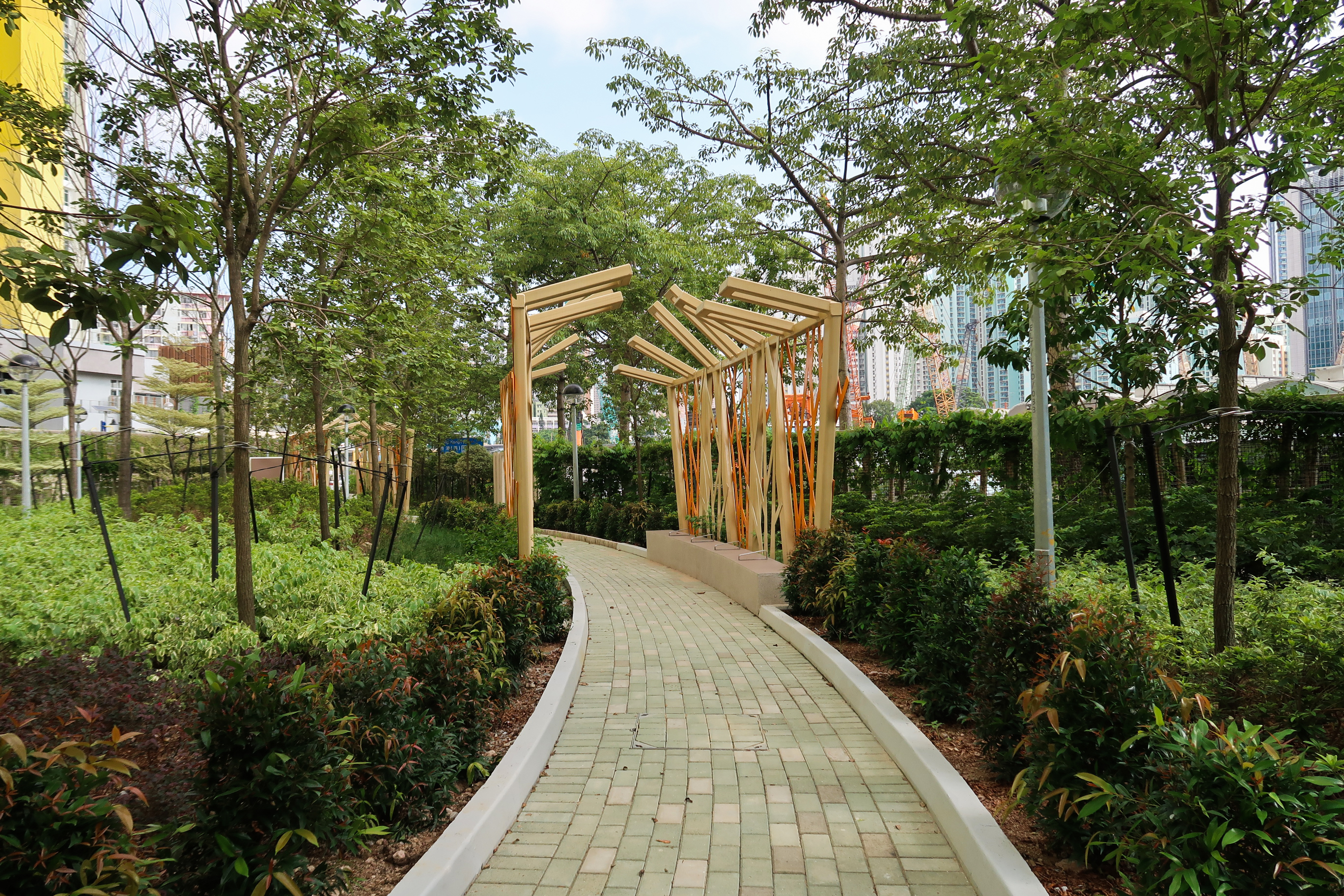 Lai Tsui Court Trellis